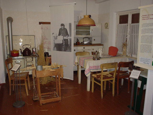 Museum der Strohverarbeitung in Twistringen; Ansicht einer Küche aus den 1950-er Jahren; in Heimarbeit wurde Stroh zu Trinkhalmen verarbeitet